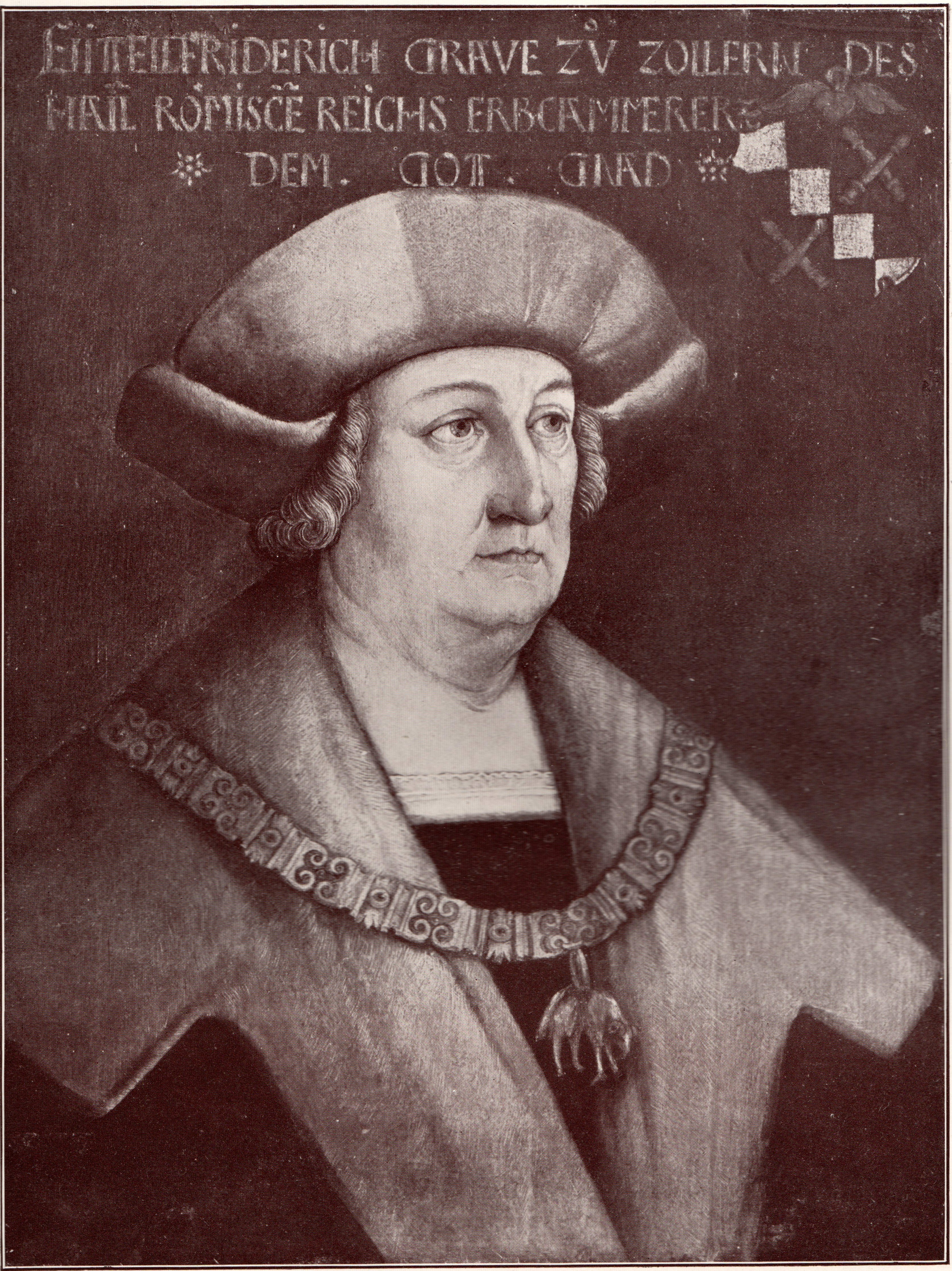 Eitel Friedrich II. von Hohenzollern.